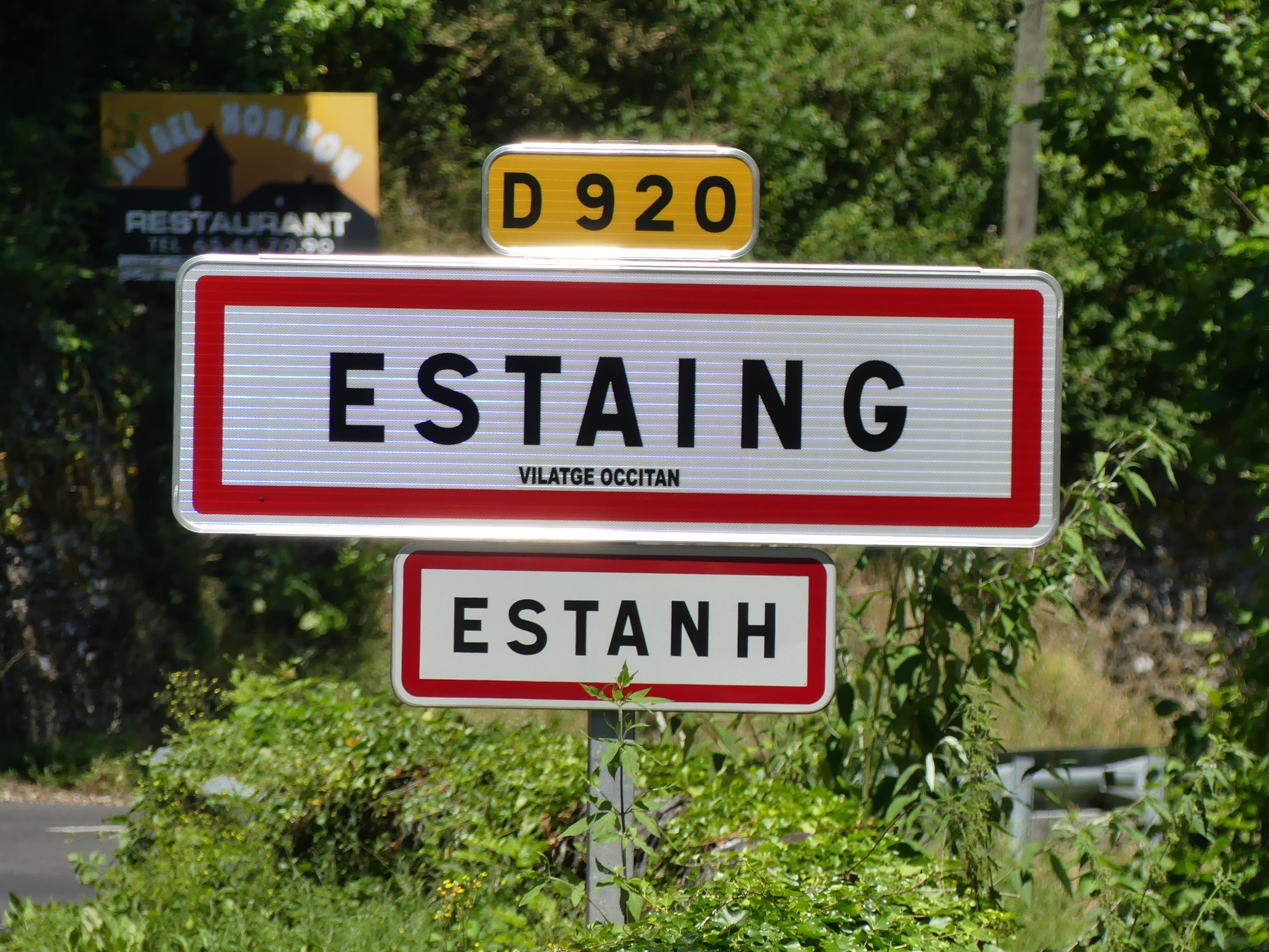 Panneau en français et occitan, Estaing, Aveyron, France.